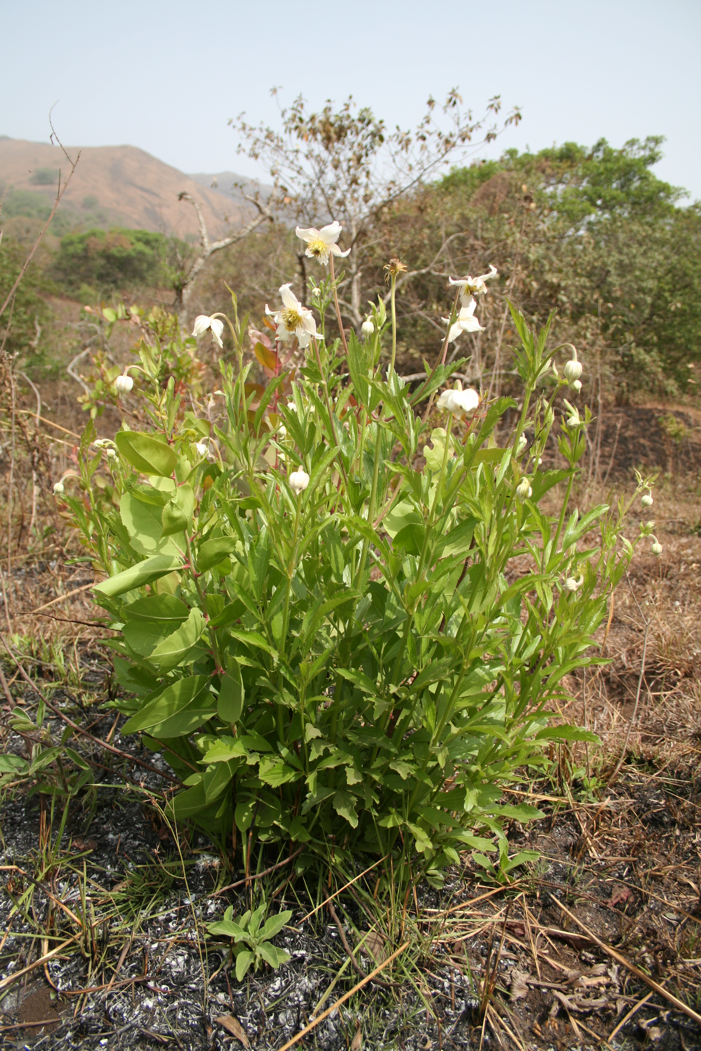 Clematis villosa (syn. Clematopsis scabiosifolia), Mt. Mbati, Cameroon